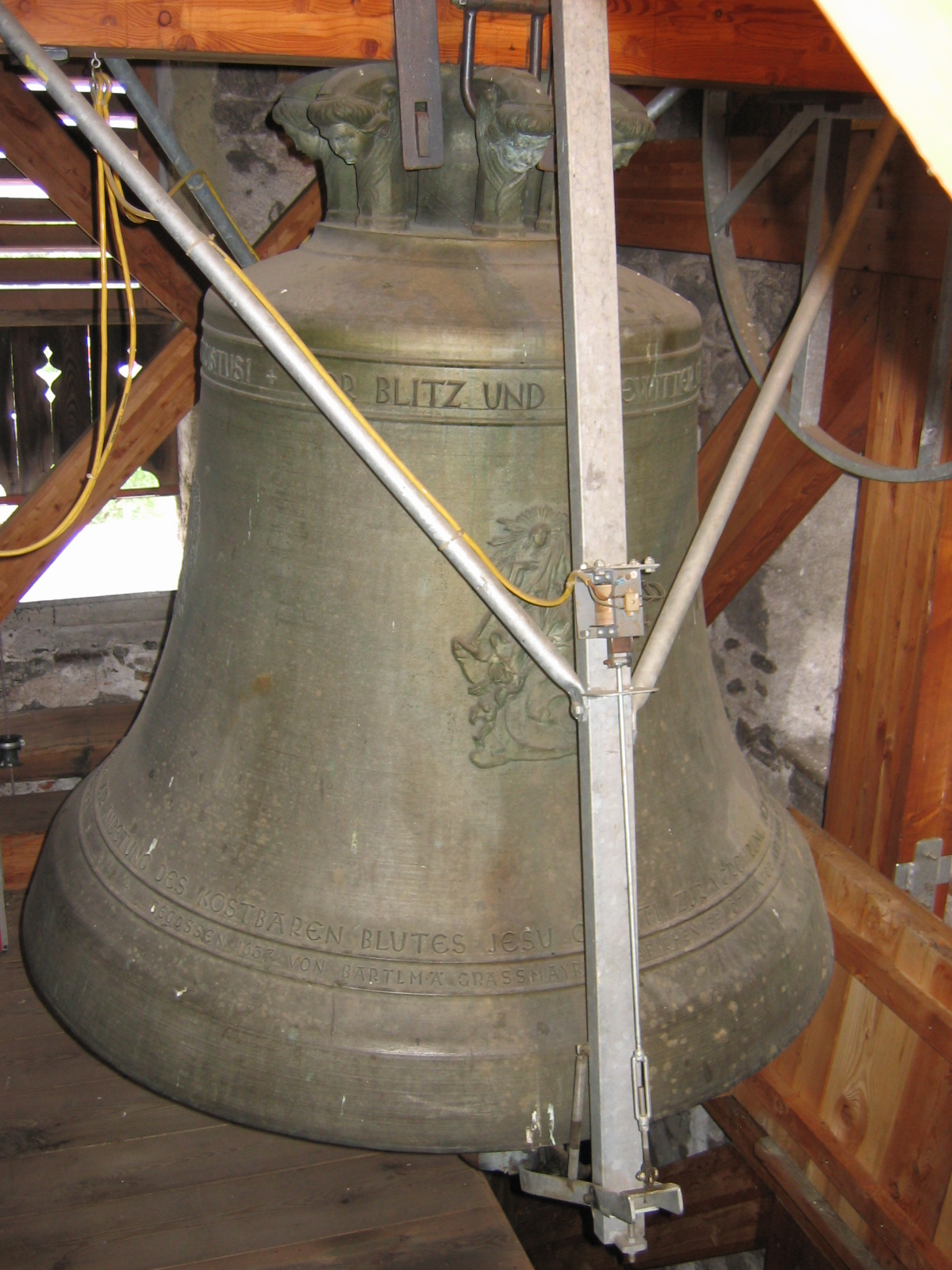 Große Glocke (h0) mit Klöppelfänger in der Pfarrkirche zu Stams (Österreich).